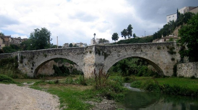 El Pont Vell El pont marcarà una reorientació de les comunicacions de la Vila. En 1520-1521 els agermanats d’Ontinyent propiciaren la construcció del camí dels Carros, des de la baixada del qual es pot contemplar una impressionant panoràmica de la Vila i del Raval, amb les cases escampades com volves de neu unes damunt d'altres. També en el segle XVI s’hi construirà el Tirador dels Peraires, on els mestres fabricants estenien i deixaven assecar els draps de llana. Aigües avall, i ja a principis del segle XVII, es documenta la transformació de les coves a la vora del riu (on habitaven les famílies més humils de la vila) en les cases de l’actual carrer de la Cantereria,vora riu.